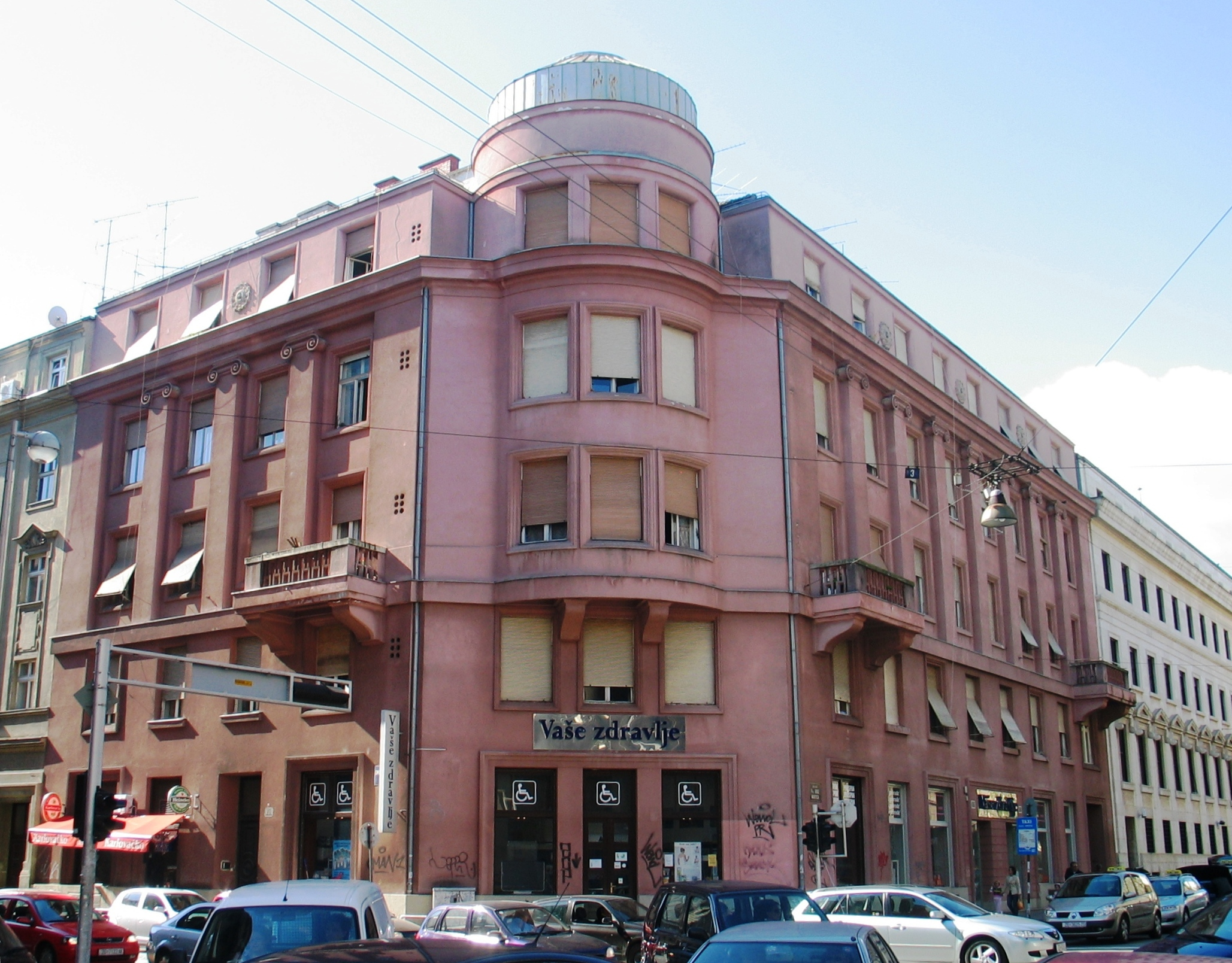 Slavko Slavko Benedikt i Aladar Baranyai- Kuća Deutsch, Martićeva 4-Smičiklasova 18, Zagreb (1927.)